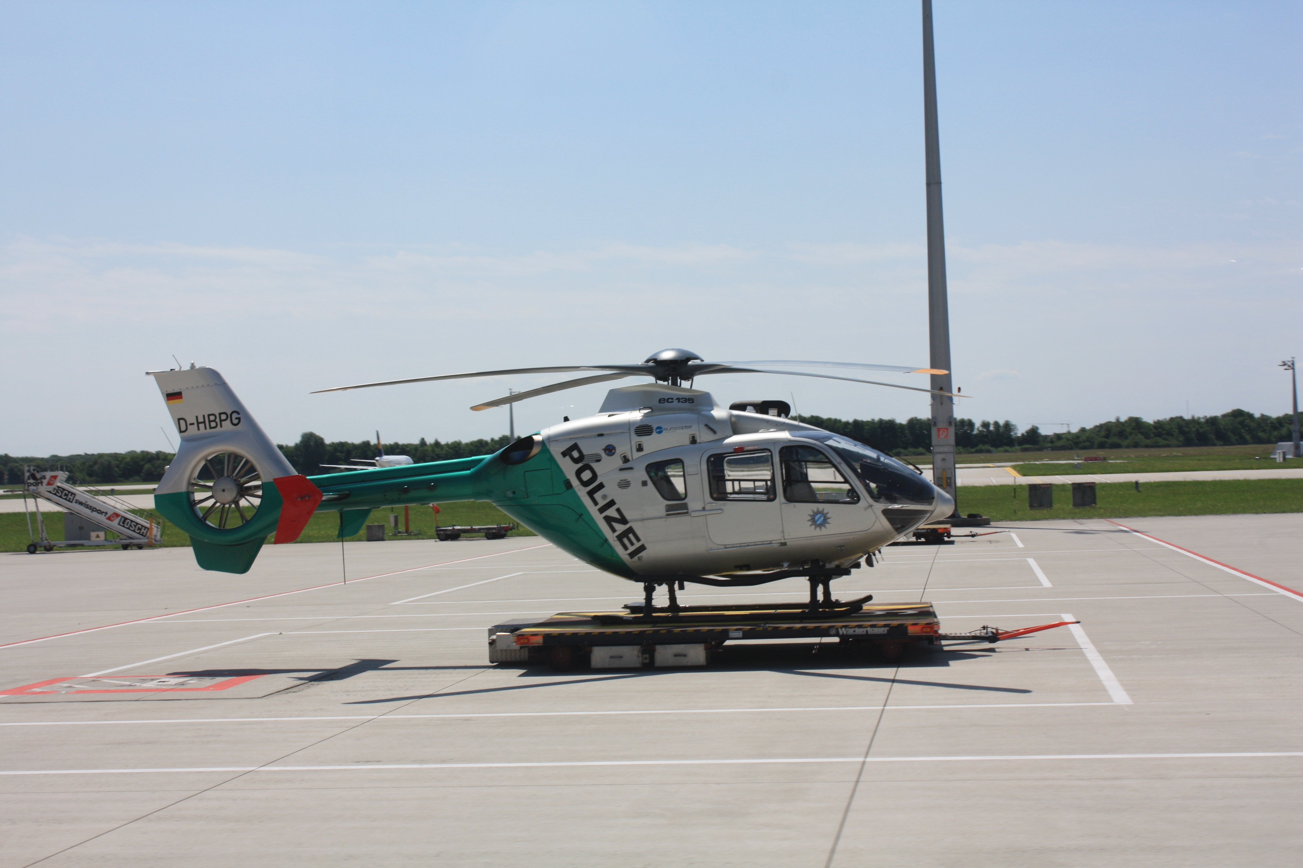 Helikopter EC 135 der Bayerischen Polizei (D-HBPG)